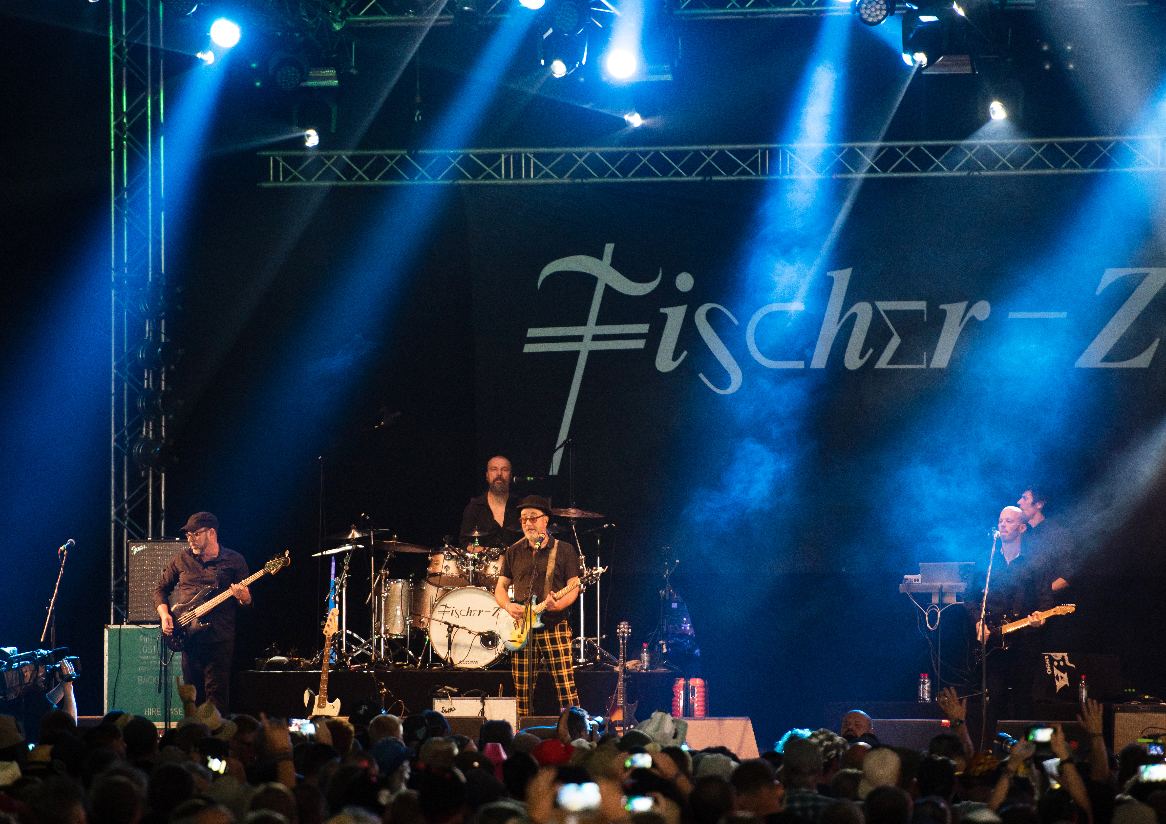 Fischer-Z beim Wacken Open Air 2018